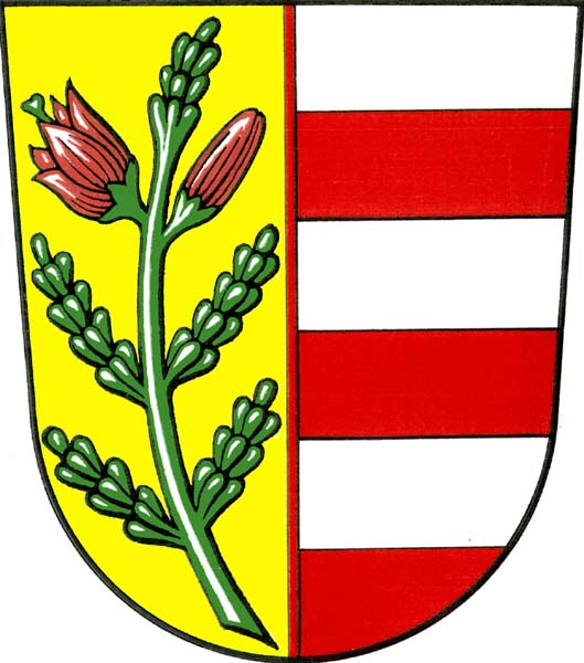 Znak obce Vřeskovice